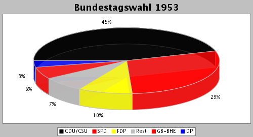 Chart Bundeswahl 1953